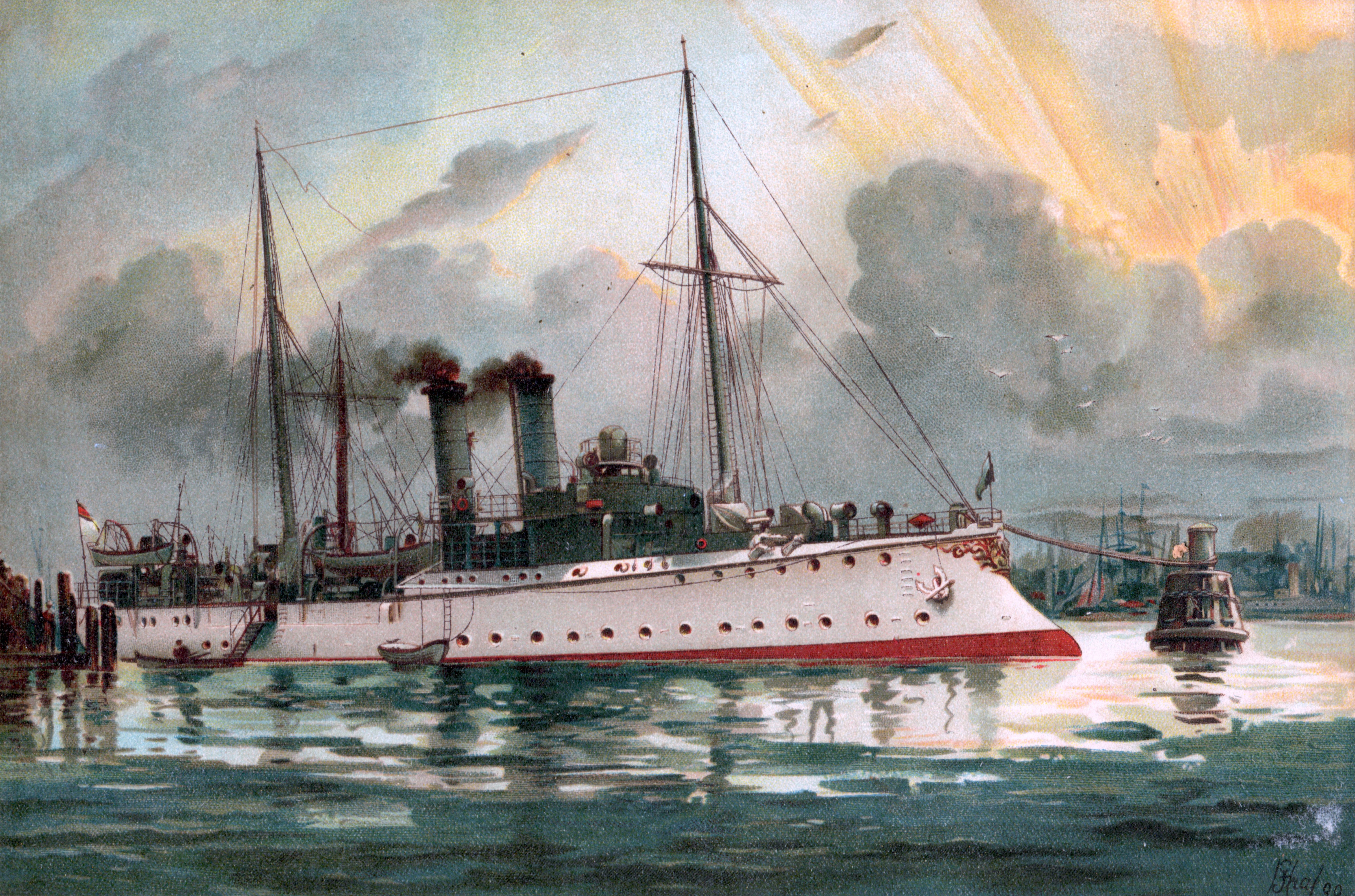 S.M. Kanonenboot Iltis